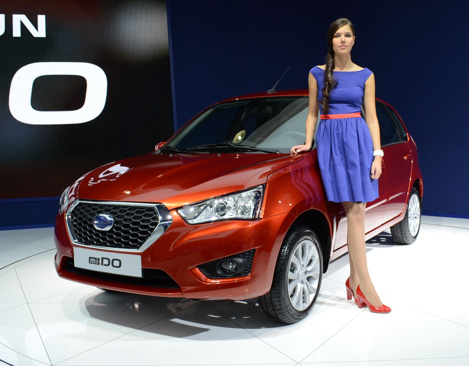 Хэтчбек Datsun mi-DO на Московском автосалоне-2014